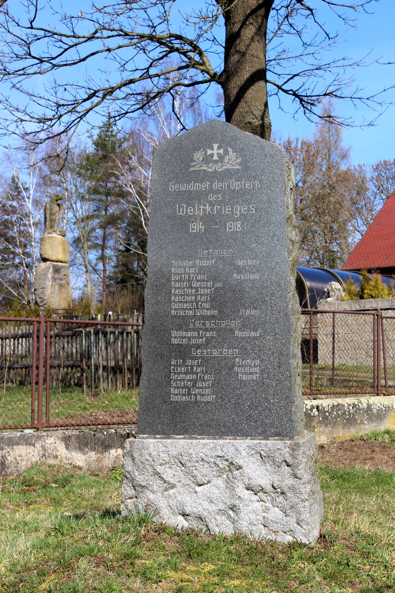 Postřelná